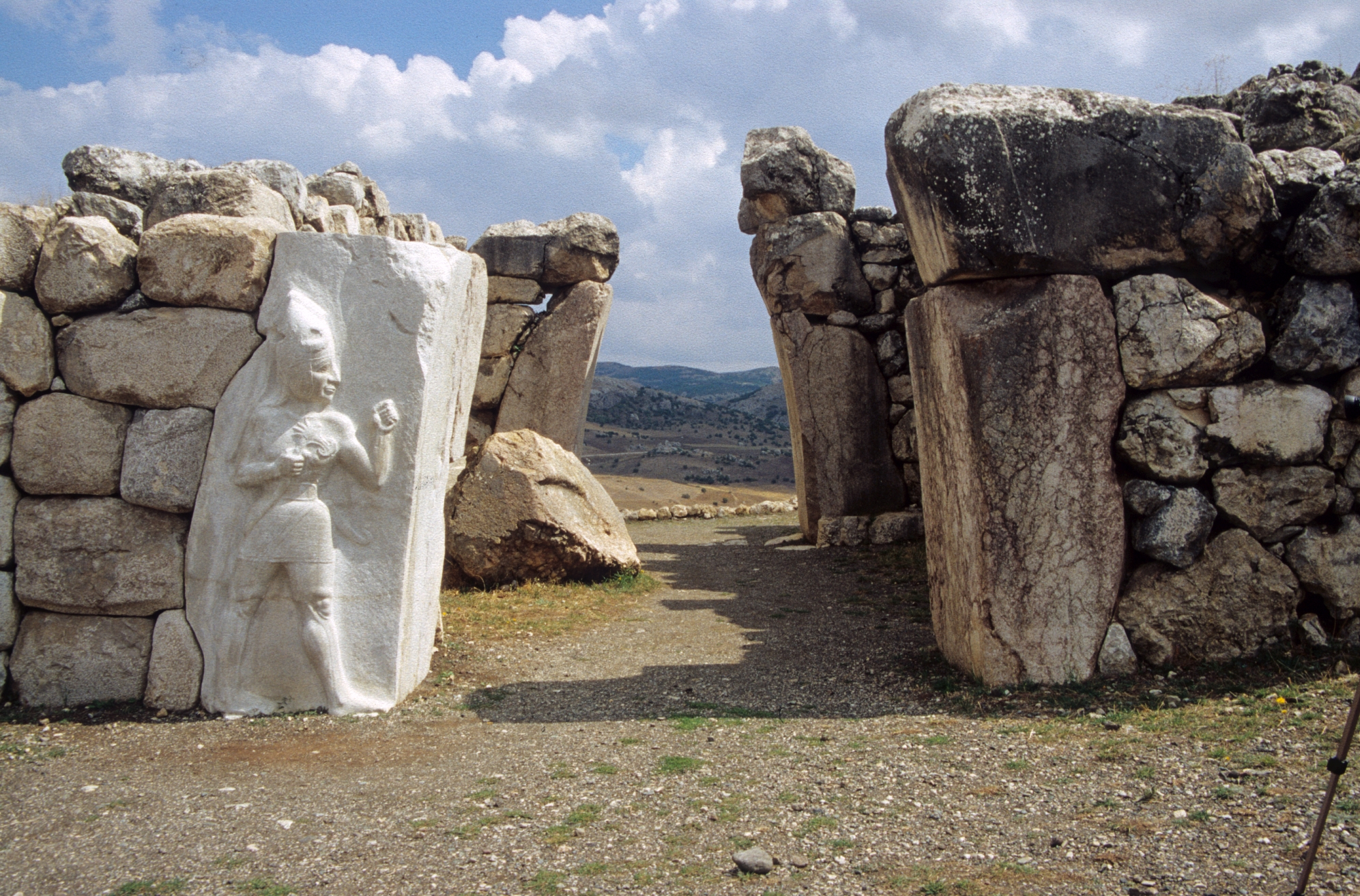 Königstor in Hattusa, Zentraltürkei